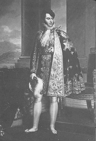 Portrait of Camillo Filippo Ludovico Borghese (1775-1832)